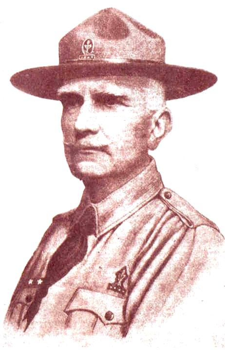 Il Conte Mario di Carpegna (1856–1924) è stato un politico italiano, fondatore — il 16 gennaio 1916 — dell’Associazione Scouts Cattolici Italiani (ASCI). Fu guardia nobile del papa ed esponente di primo piano del movimento cattolico romano.